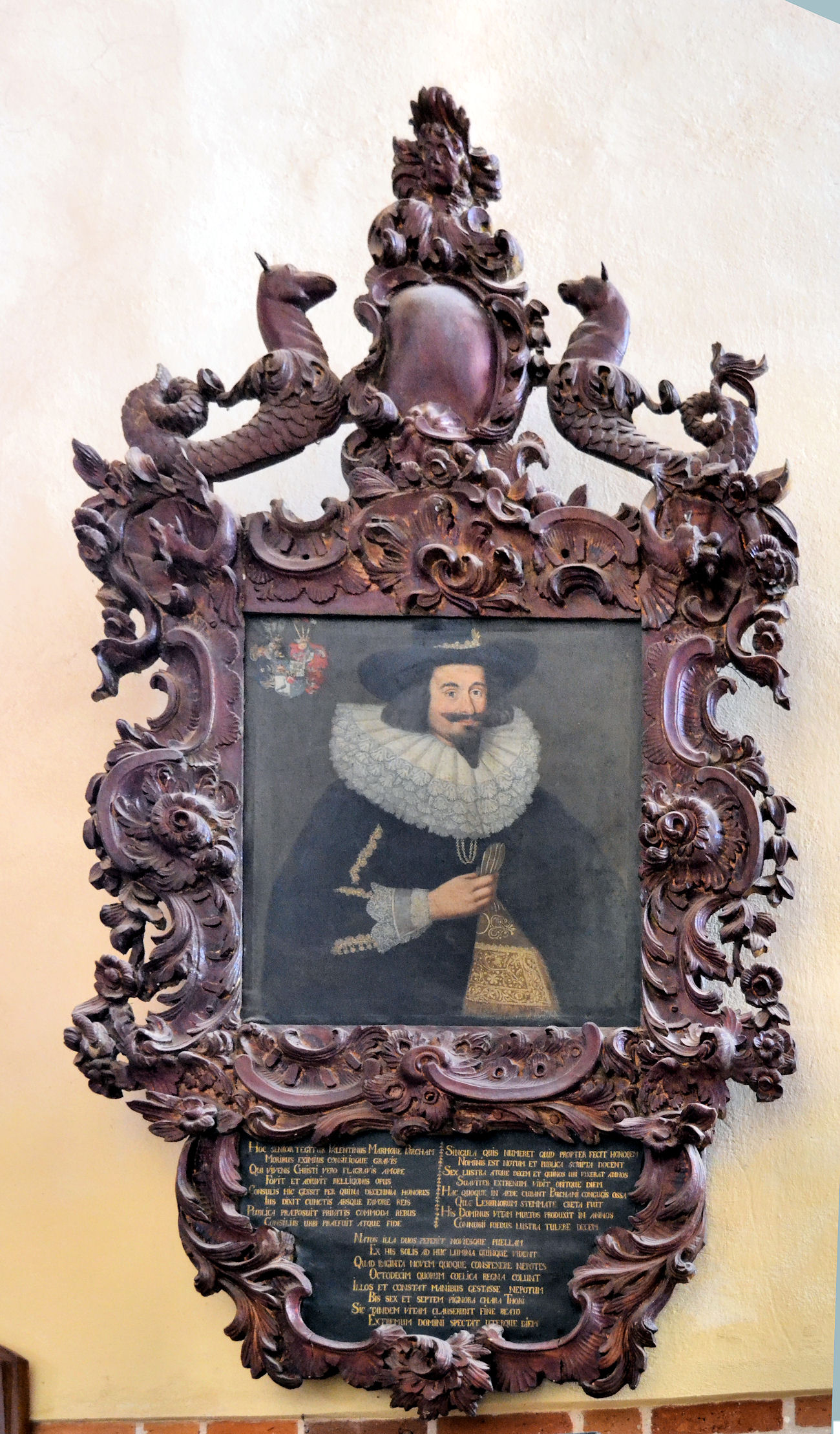 kościół Macierzyństwa NMP Trzebiatów